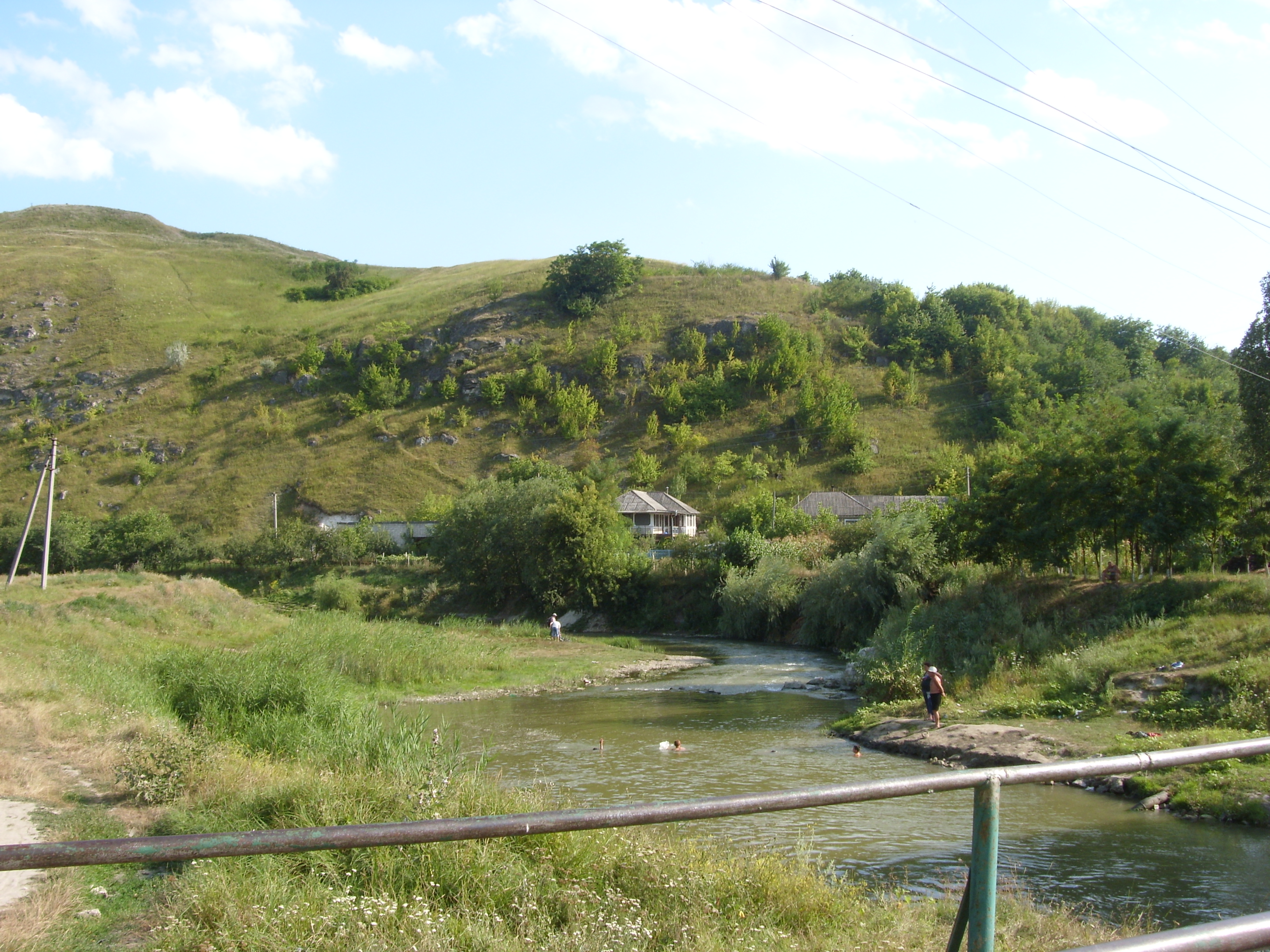 р. Реут в г. Оргеев